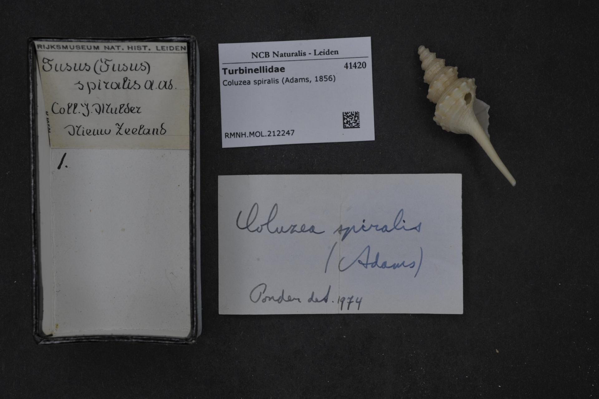 Coluzea spiralis (Adams, 1856)